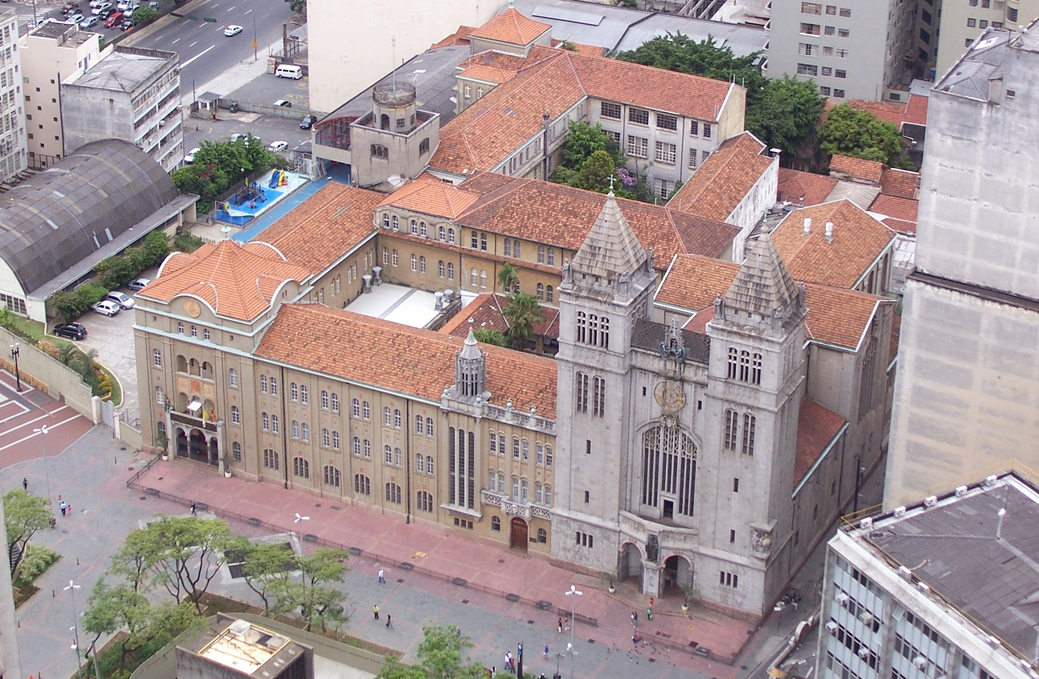 View of São Bento Monastery in São Paulo, Brazil.